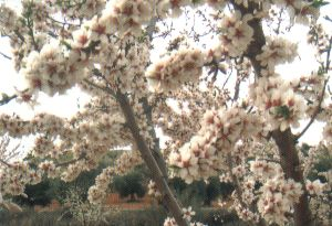 Almedro en flor.